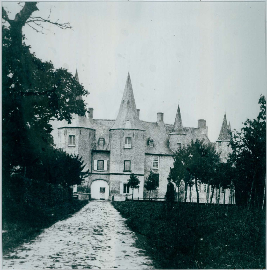 Kasteel van Wijnendale rond 1850